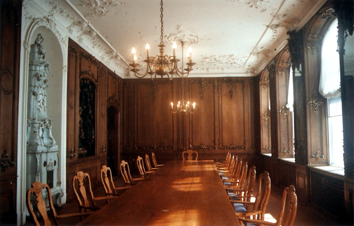 Das Dimpckersche Zimmer in der ehemaligen Steuerbehörde in der Fleischhauerstraße 20